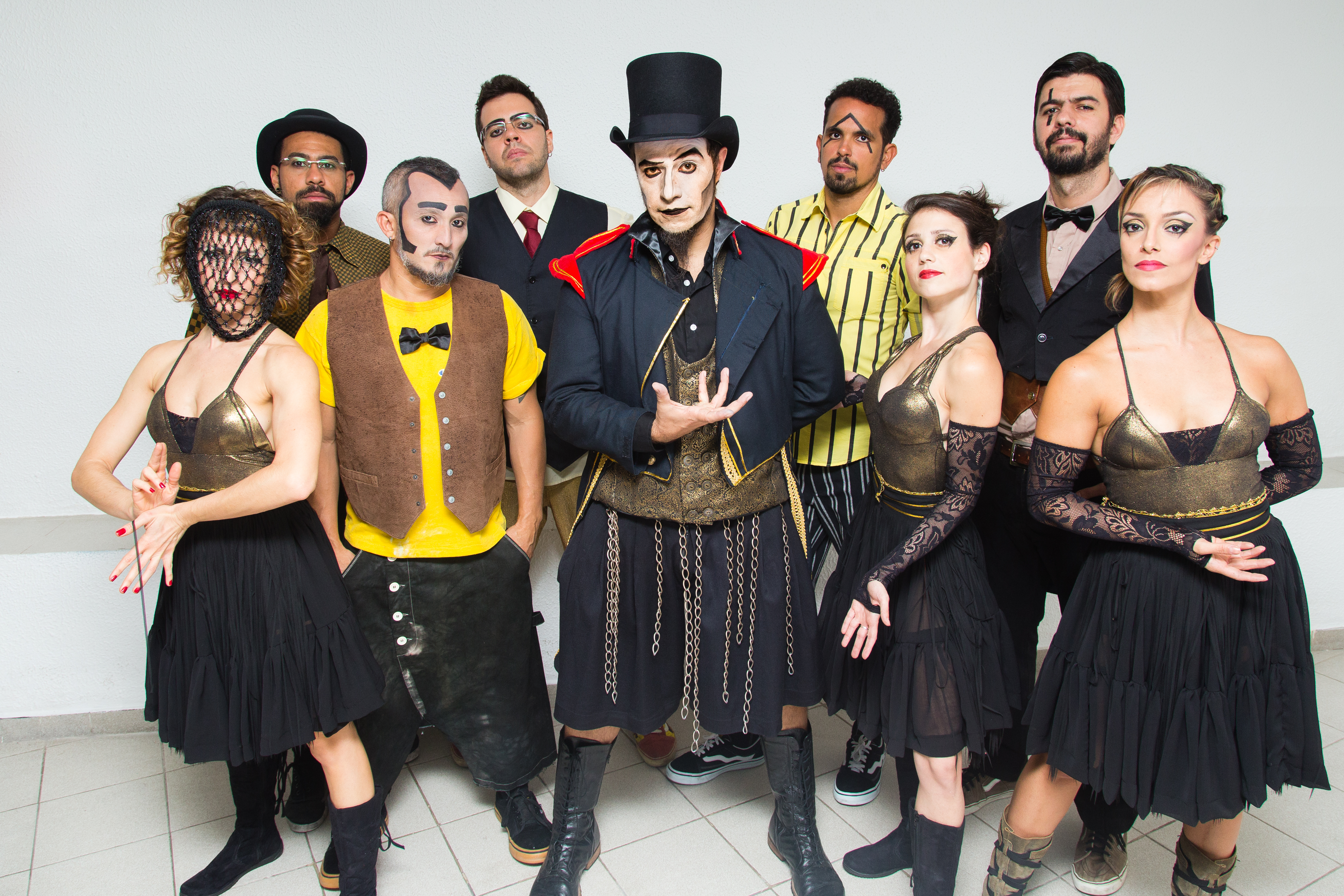 Foto de divulgação